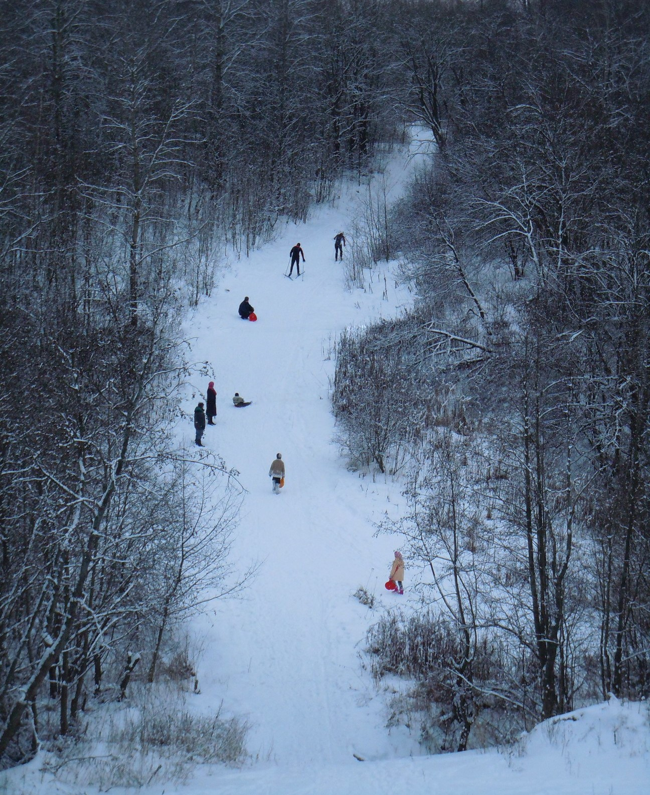 Овраг в Шурсколе, по возвышенности которого катаются с горки и на лыжах. Овраг расположен в котловине озера Неро, а именно вдоль реки Мазиха.